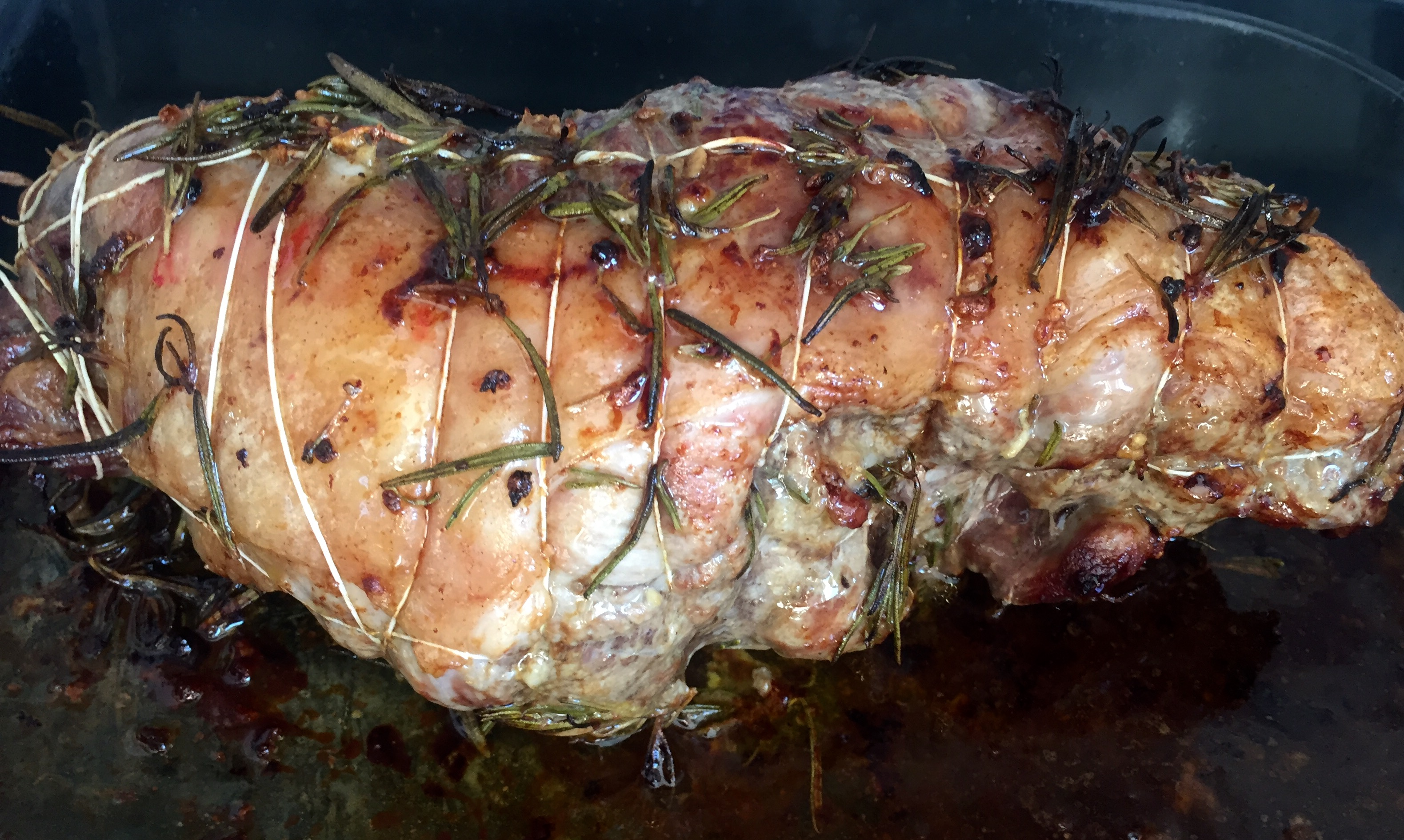 Un gigot d'agneau.